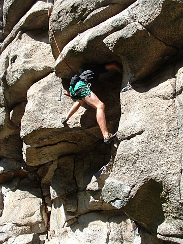 Klettern im Steinwald, Fichtelgebirge, Morgentauweg Fotograf: Martin Riedl Datum: 2005 Copyright Status: GFDL